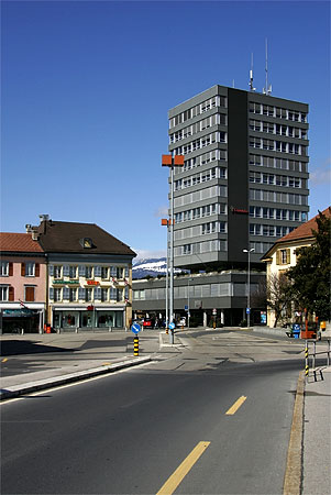 Yverdon: Place de Bel-Air